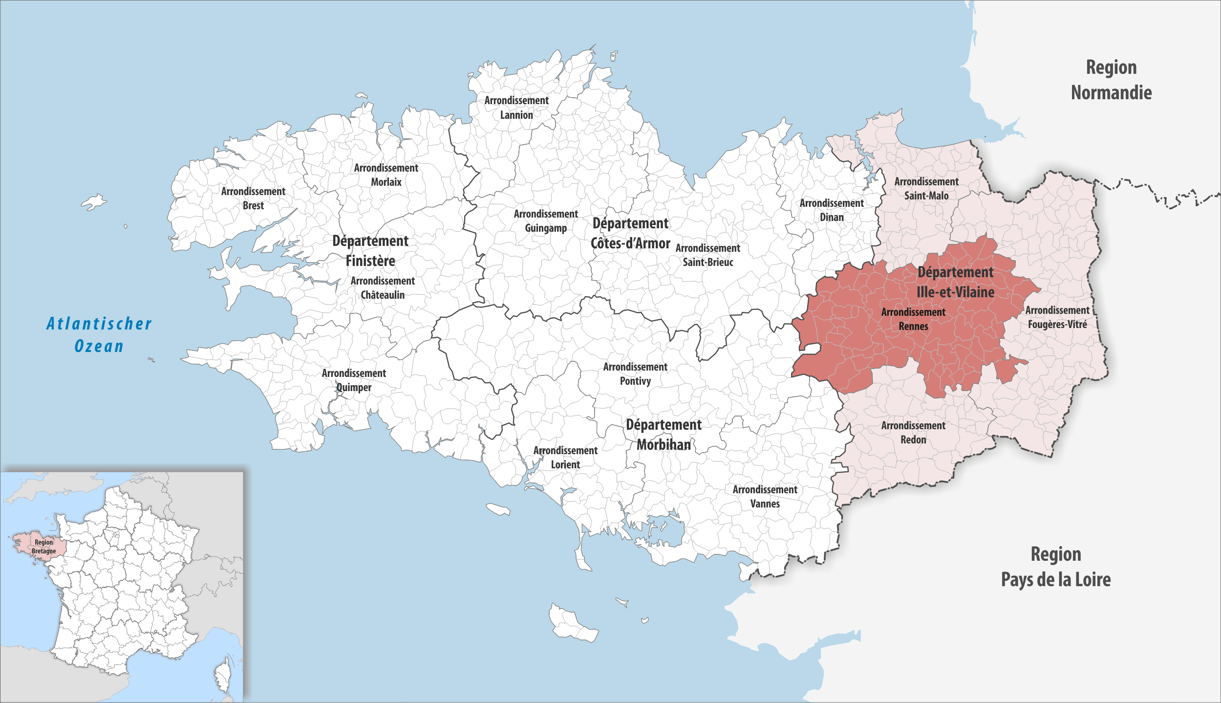 Lage des Arrondissements Rennes